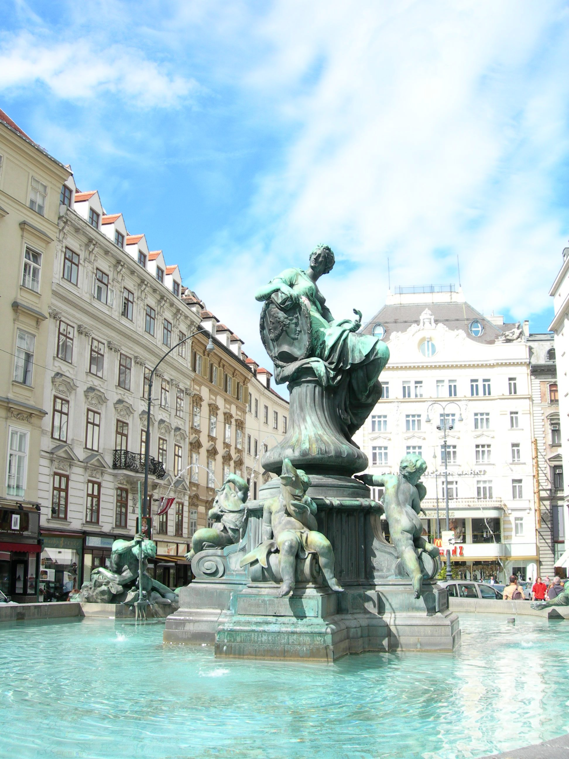 Donnerbrunnen at the Neuer Markt in Vienna